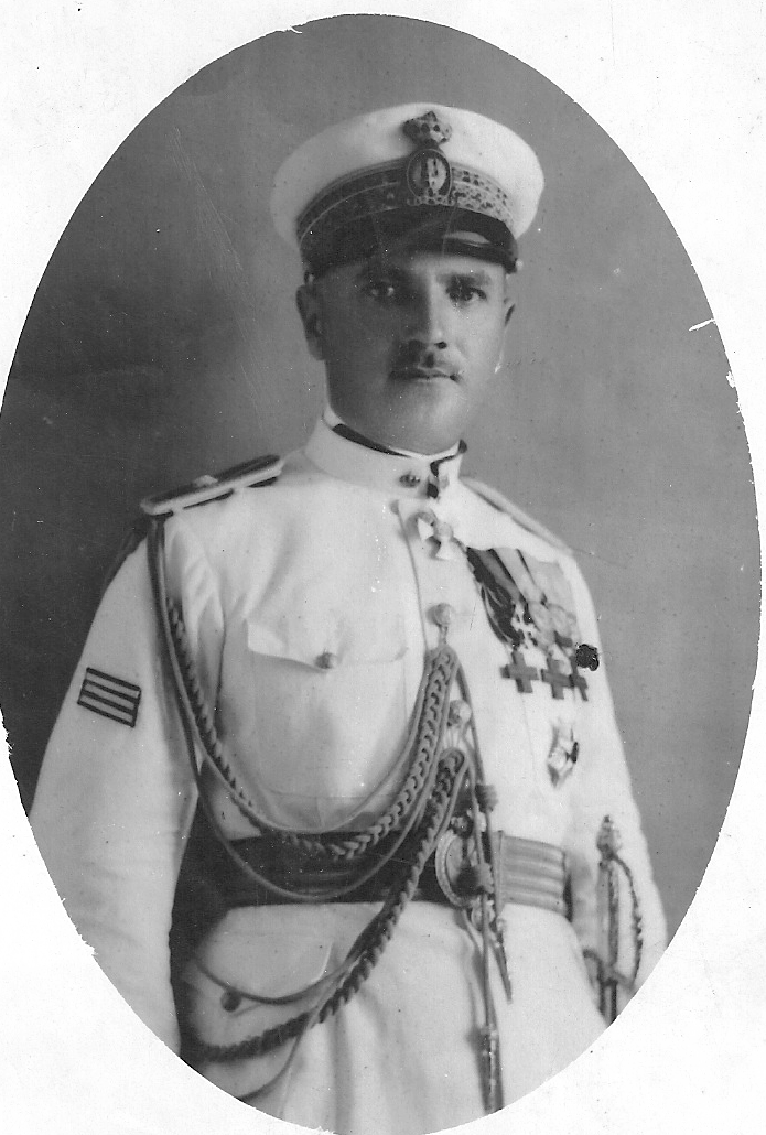 Camillo Bechis in divisa coloniale